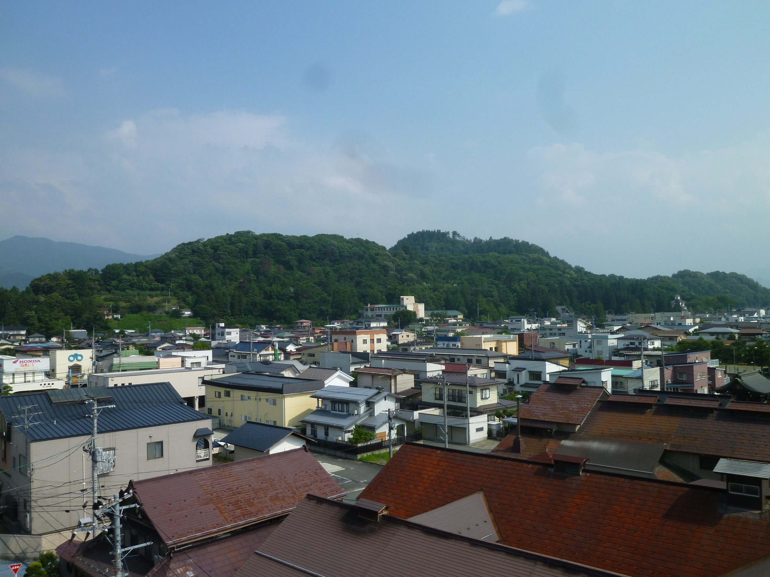 舞鶴山。山形県天童市に所在。天童城址。 天童駅付近からの撮影。